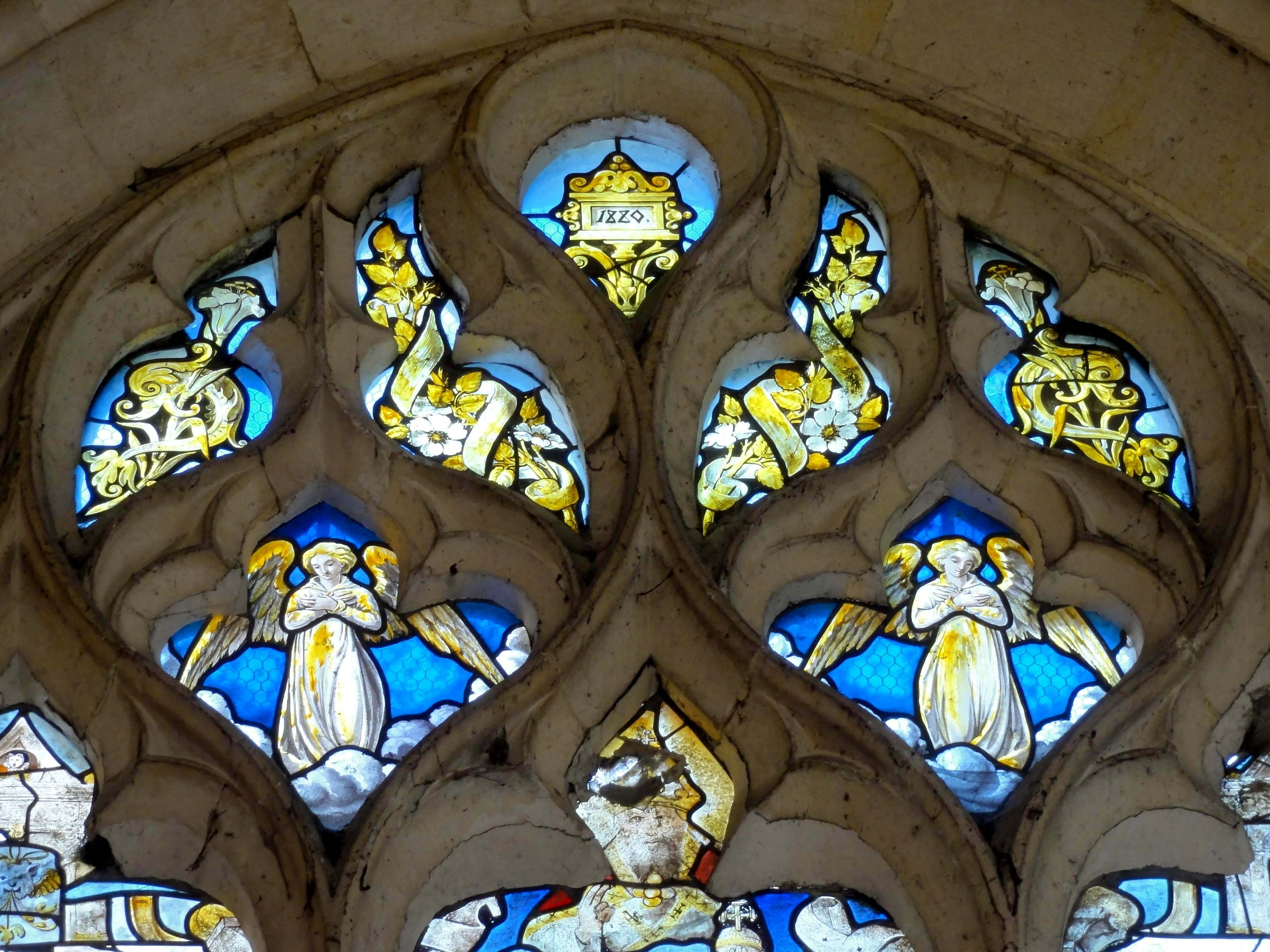 Verrière n° 6, Vie de la Vierge (voir titre). Verrière Renaissance restaurée en 1880 (et non 1820). Elle se trouve au chevet du croisillon sud (n° 6) et non au sud de l'abside (n° 4).